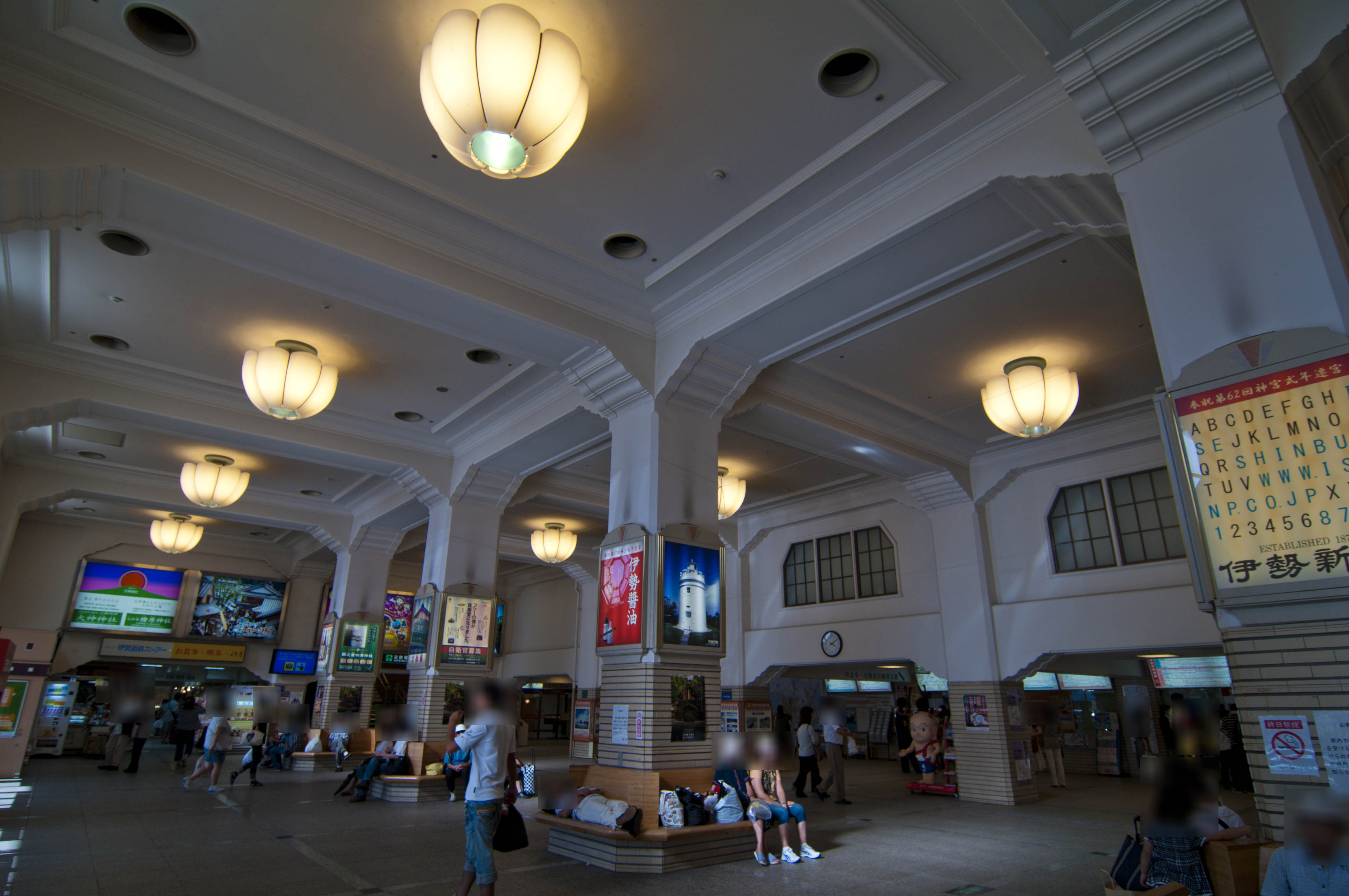 近畿日本鉄道山田線・鳥羽線 宇治山田駅構内写真